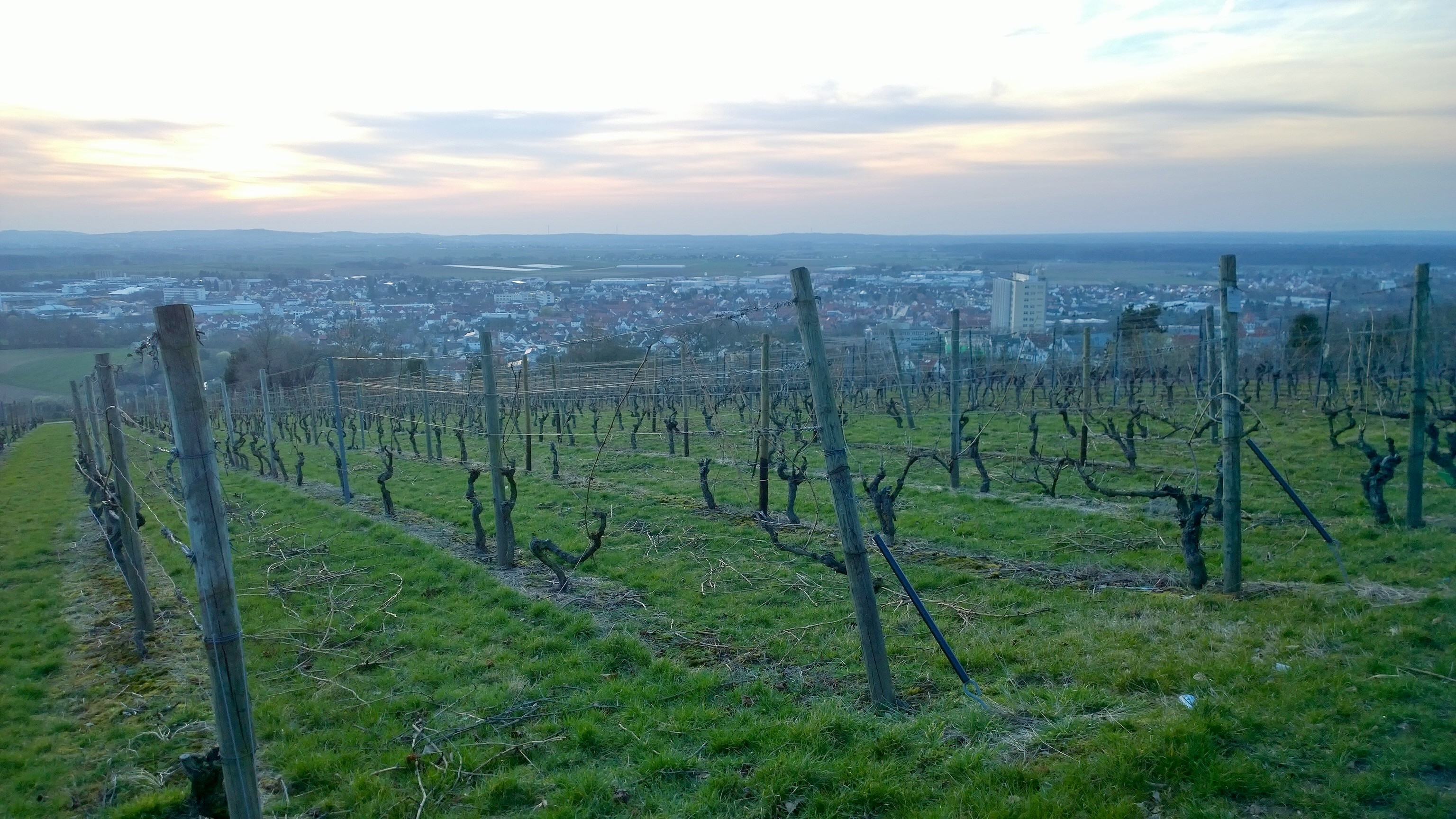 Abendblick nach Nordwesten auf Groß-Umstadt vom Hainrichsberg, Weingebiet "Einzellage Am Herrnberg" und Weinlehrpfad, der unterhalb des Weinbergs sichtbare Baumgruppenbereich ist Teil des Naturschutzgebietes "Herrnberg von Groß-Umstadt"